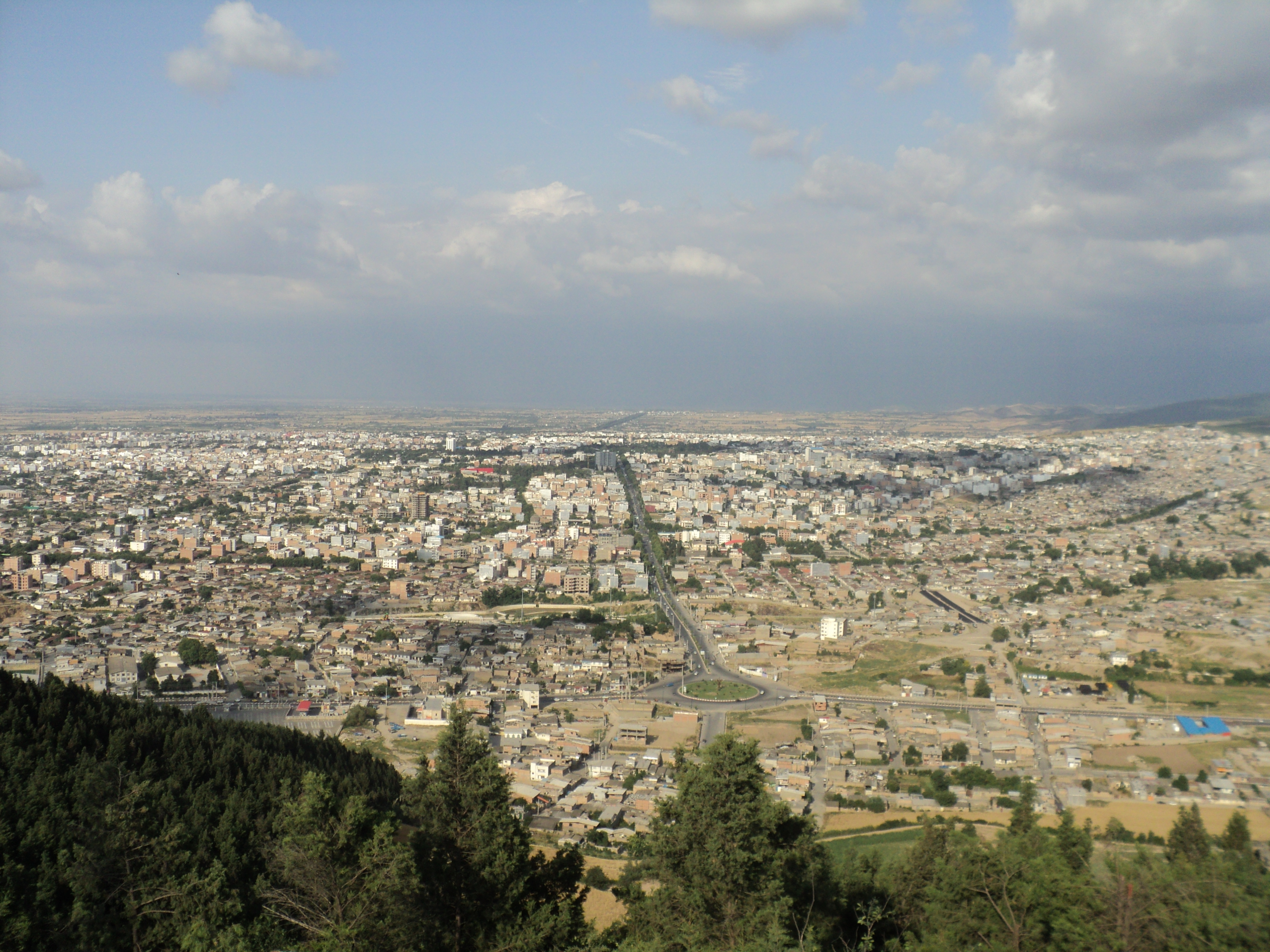 این عکس از شهر گارگان از نمای هزارپیچ گرفته شده